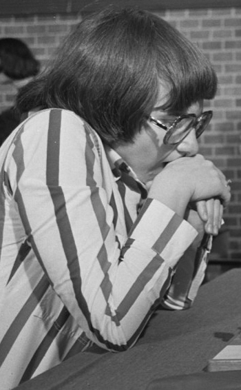 Hoogovenschaaktoernooi 1976; Alla Kusnir